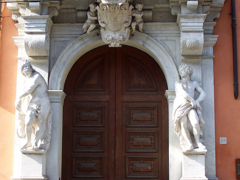 Parma - Portale d'ingresso di Palazzo Rangoni Farnese